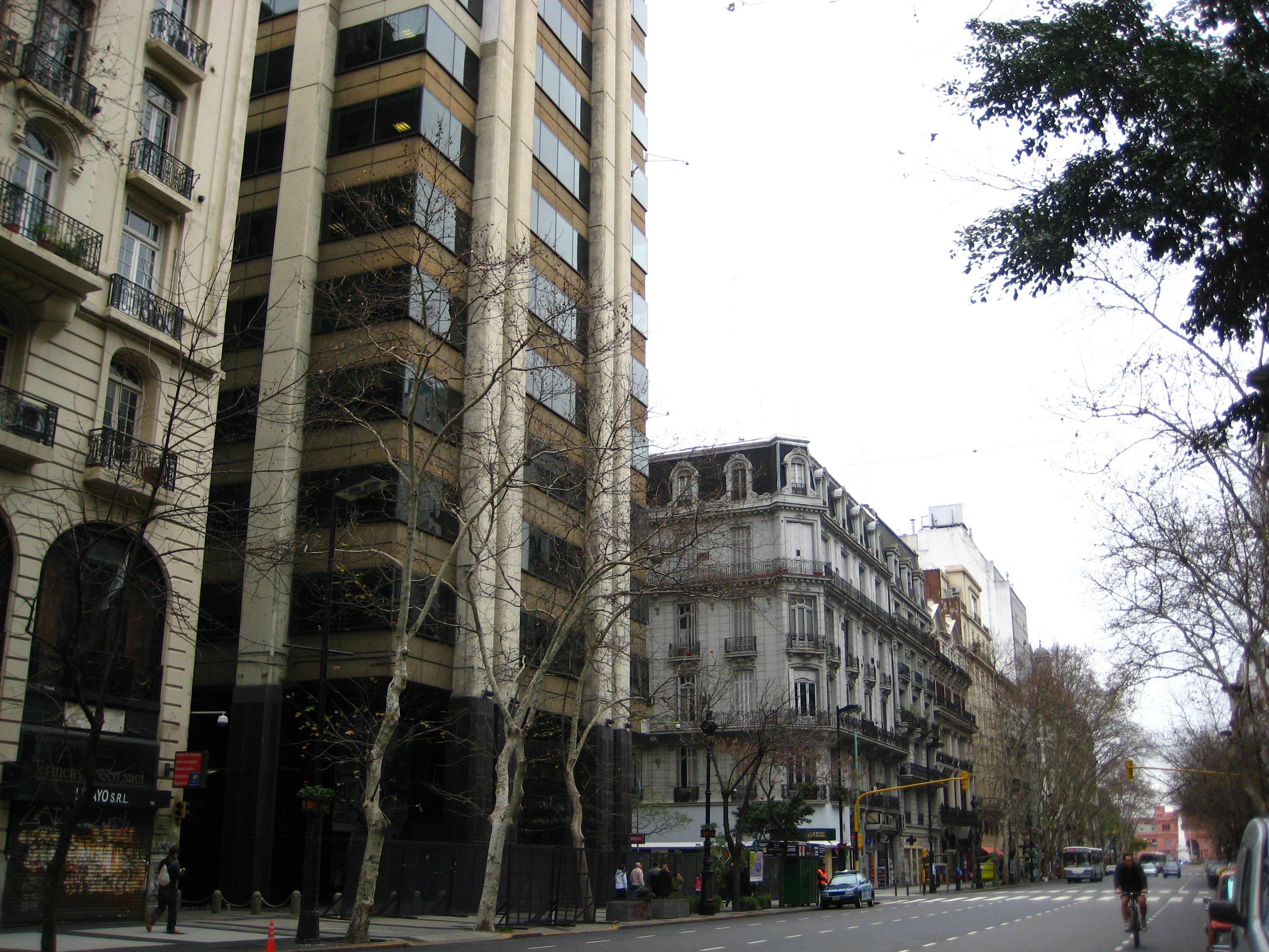 Avenida de Mayo entre Piedras y Chacabuco, barrio de Monserrat, Buenos Aires, Argentina.